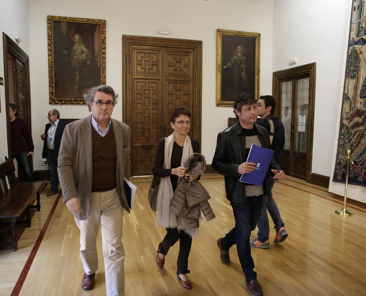 El Comisionado de Memoria Histórica propone renombrar 47 calles de Madrid. El informe ha sido aprobado por unanimidad de sus miembros en aplicación del artículo 15 de la ley 52/2007. El órgano de asesoramiento municipal que preside Francisca Sauquillo hace su recomendación a tenor de lo dispuesto en la citada norma legal, que establece que “las Administraciones públicas, en el ejercicio de sus funciones, tomarán las medidas oportunas para la retirada de escudos, insignias, placas y otros objetos o menciones conmemorativas de exaltación, personal o colectiva, de la sublevación militar, de la Guerra Civil y de la represión de la dictadura” del general Francisco Franco. Las propuestas de nuevas denominaciones se basan en el principio general de recuperar los nombres antiguos de las calles, especialmente cuando son aún recordados y nombrados así por los vecinos. Cuando esto no sea posible por razones diversas, el Comisionado considera que se debe homenajear a mujeres ilustres, a instituciones pedagógicas o personajes de la cultura que contribuyeron a engrandecer el patrimonio inmaterial en tiempos difíciles, y a políticos que se caracterizaron por la defensa de posiciones conciliatorias.